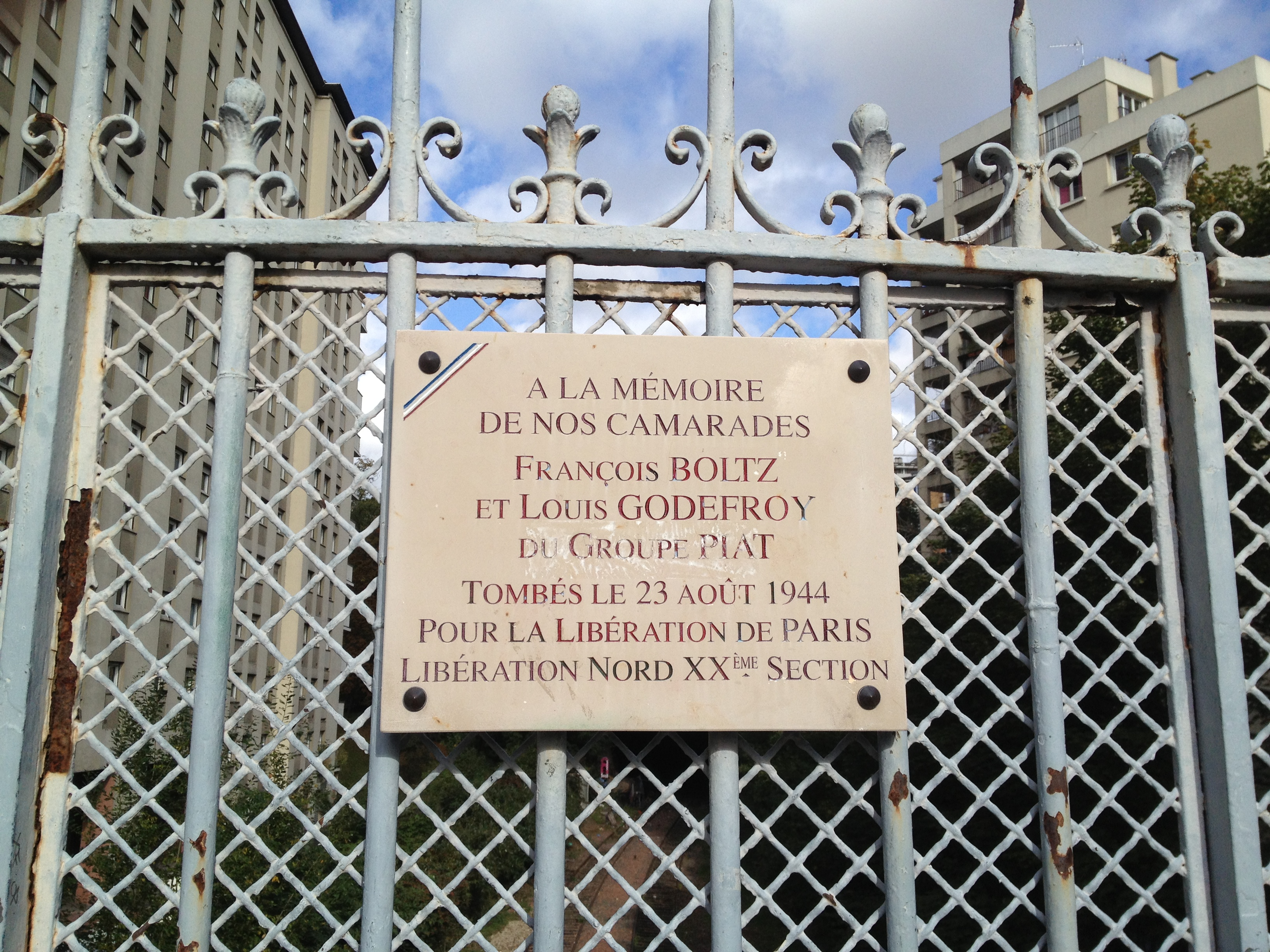 Plaque commémorative sur passerelle de la Mare, en surplomb de la ligne de Petite Ceinture, dans le 20e arrondissement de Paris (France) : « À la mémoire / de nos camarades / François Boltz / et Louis Godefroy / du Groupe Piat / Tombés le 23 août 1944 / Pour la Libération de Paris / Libération Nord XXème Section ».